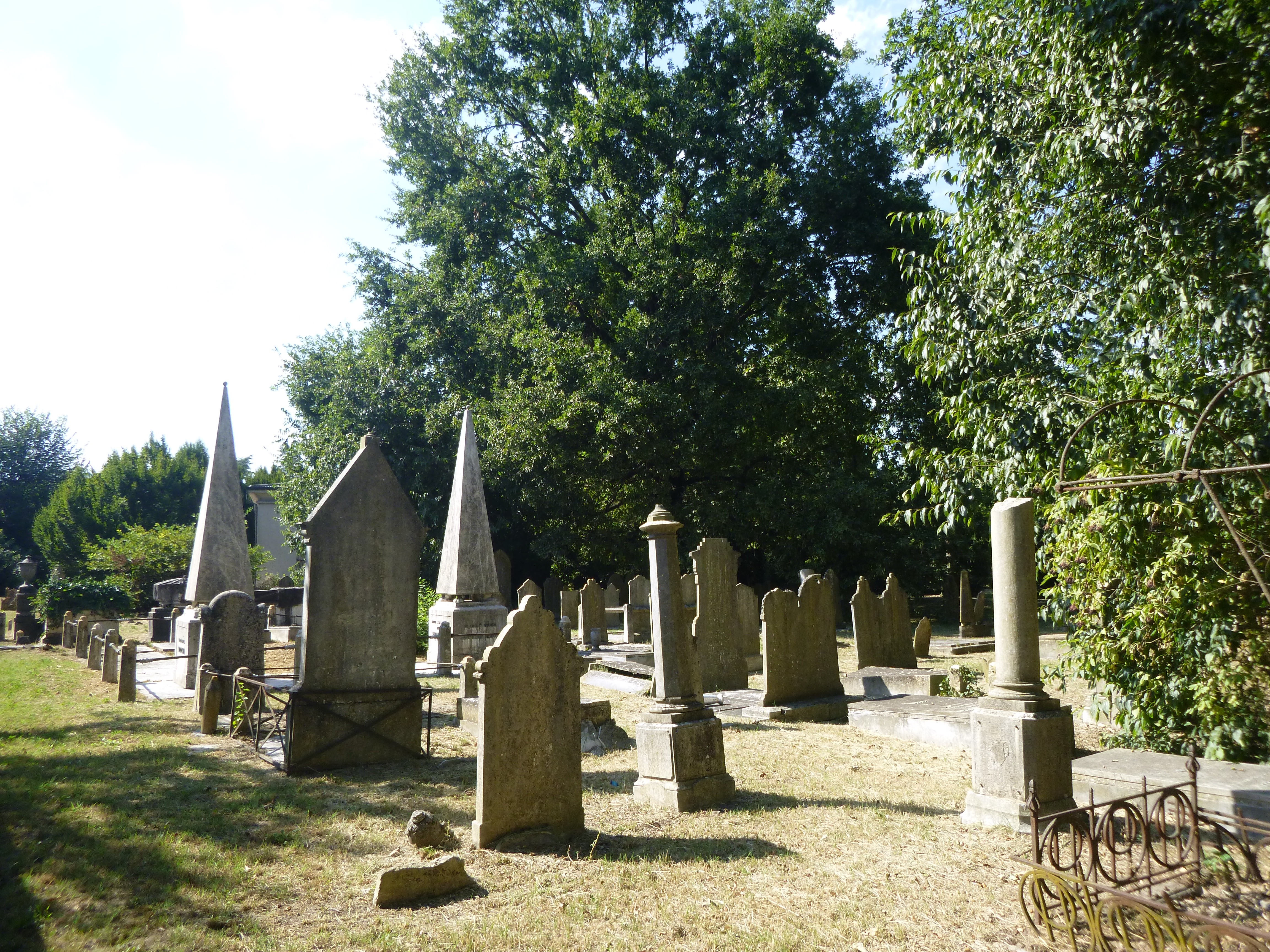 Gräberfeld des jüdischen Friedhofs in Ferrara